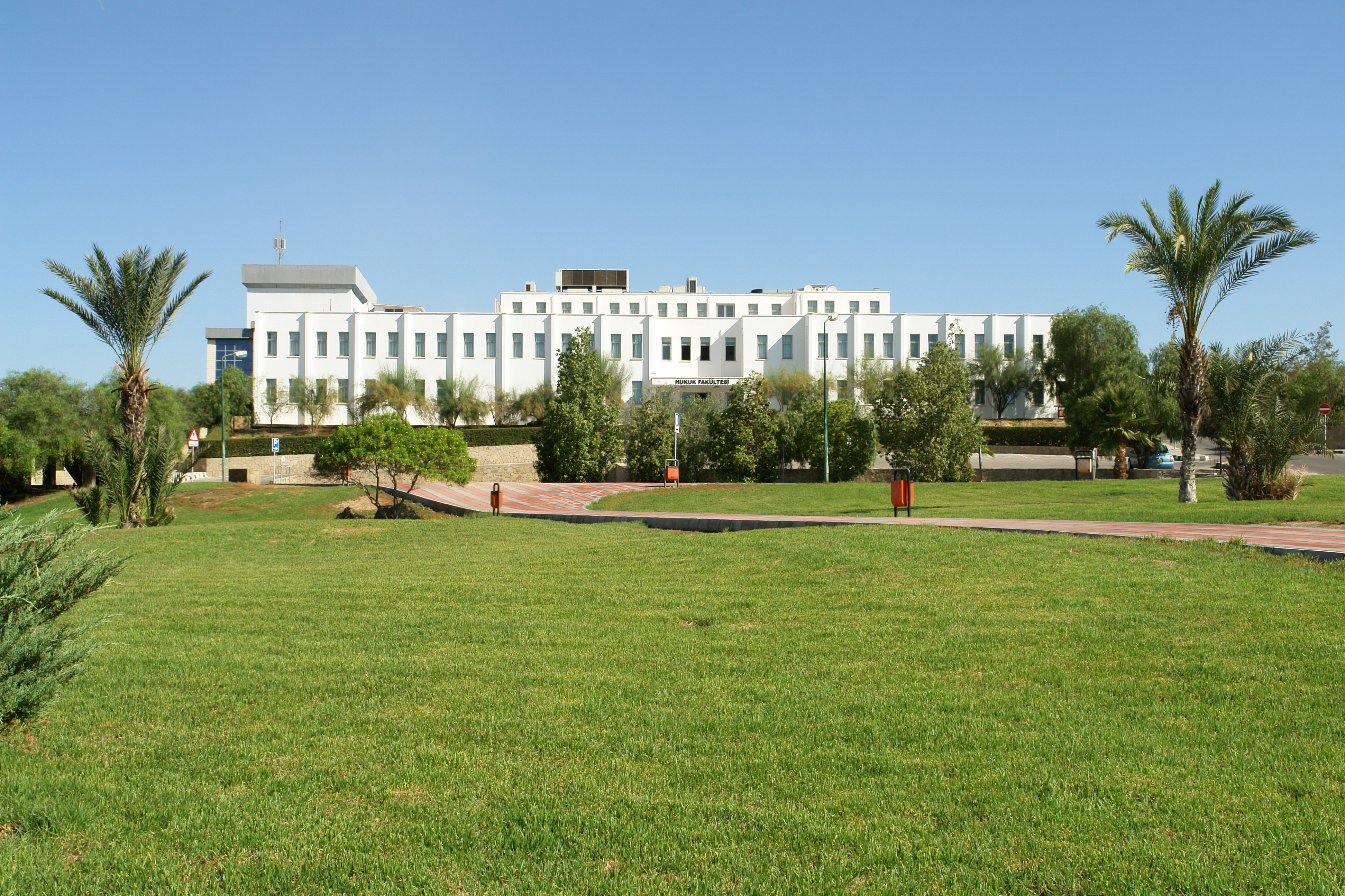 Yakın Doğu Üniversitesi Hukuk Fakültesi.